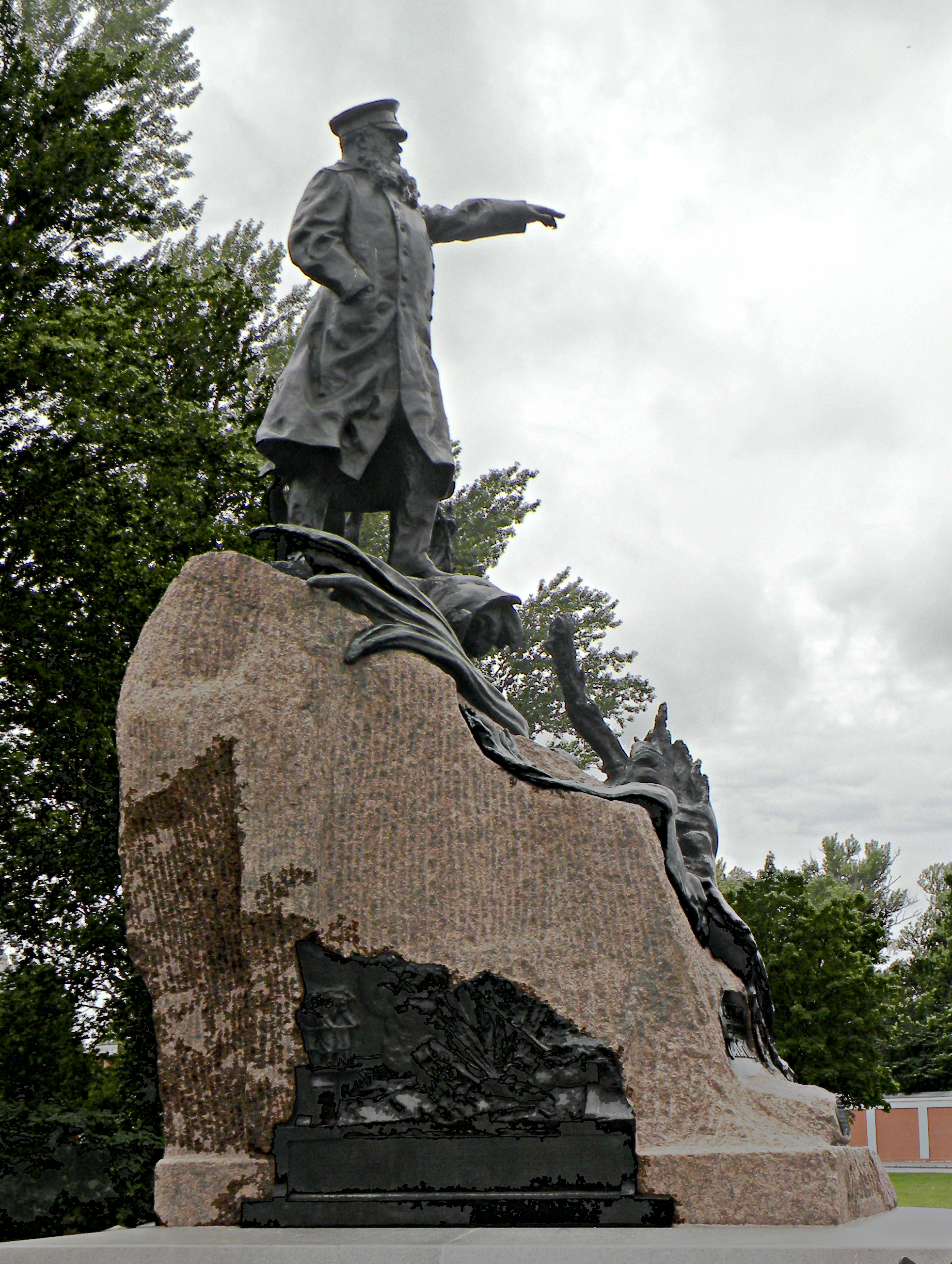 Makarovs monument.Kronstadt.